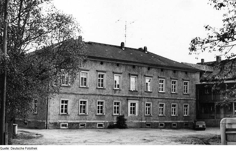 Original image description from the Deutsche FotothekTriebischtal-Robschütz. Ehem. Gut, zu dem die Mühle am Ziegenmarkt gehörte